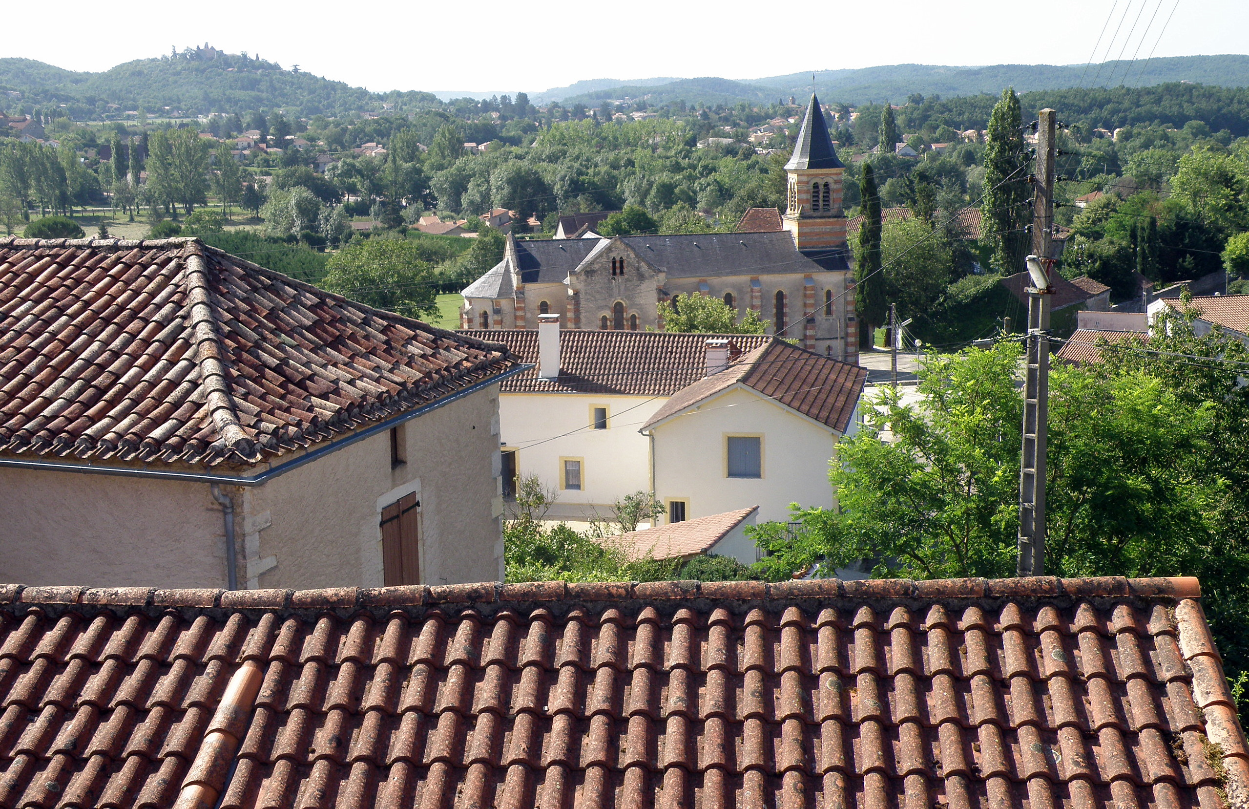 Espère, commune et village du dép. du Lot, à une dizaine de km (à vol d’oiseau) au nord-ouest de Cahors (région Midi-Pyrénées, France). Vue générale, prise depuis la rue du Château (jonction rue du Soleilhou). Nous regardons vers le sud-sud-est. On aperçoit : l’église Saint-Laurent d’Espère (XIXe) ; au loin, derrière la flèche de l’église, le village de Mercuès, d’où l’on voit émerger, un peu à gauche de la pointe de la flèche de l’église d’Espère, le clocher à section rectangulaire de l’église Saint-Germain de Mercuès (XIVe) ; à gauche à l’horizon, on distingue, coiffant une élévation, la silhouette du château de Mercuès.